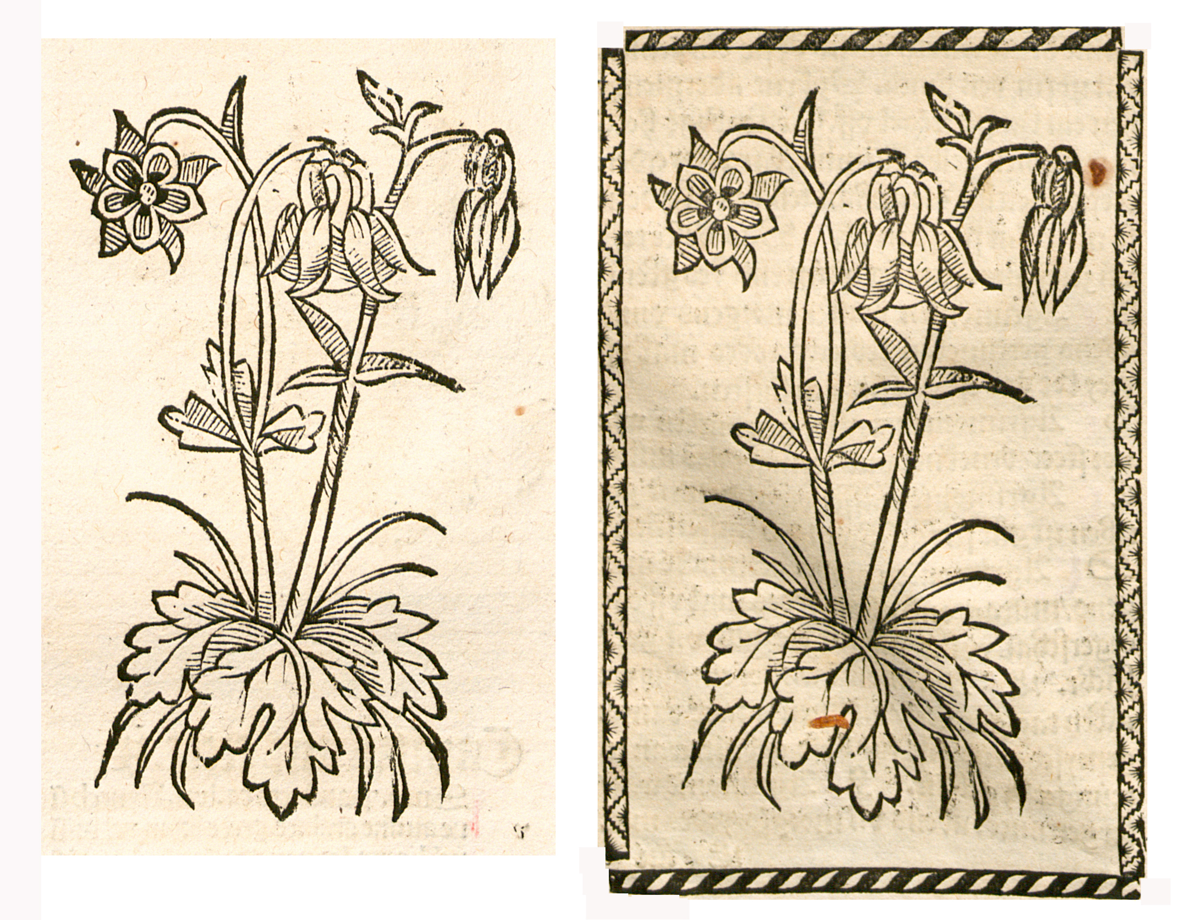 Abbildung von Aquilegia vulgaris